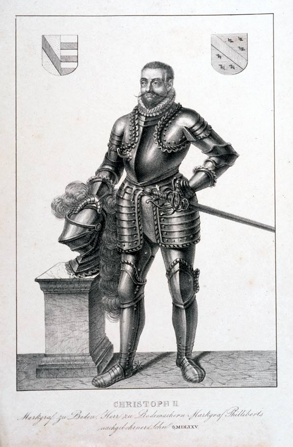 Markgraf Christoph II. von Baden (* 26. Februar 1537; † 2. August 1575 in Ösel) war Markgraf von Baden